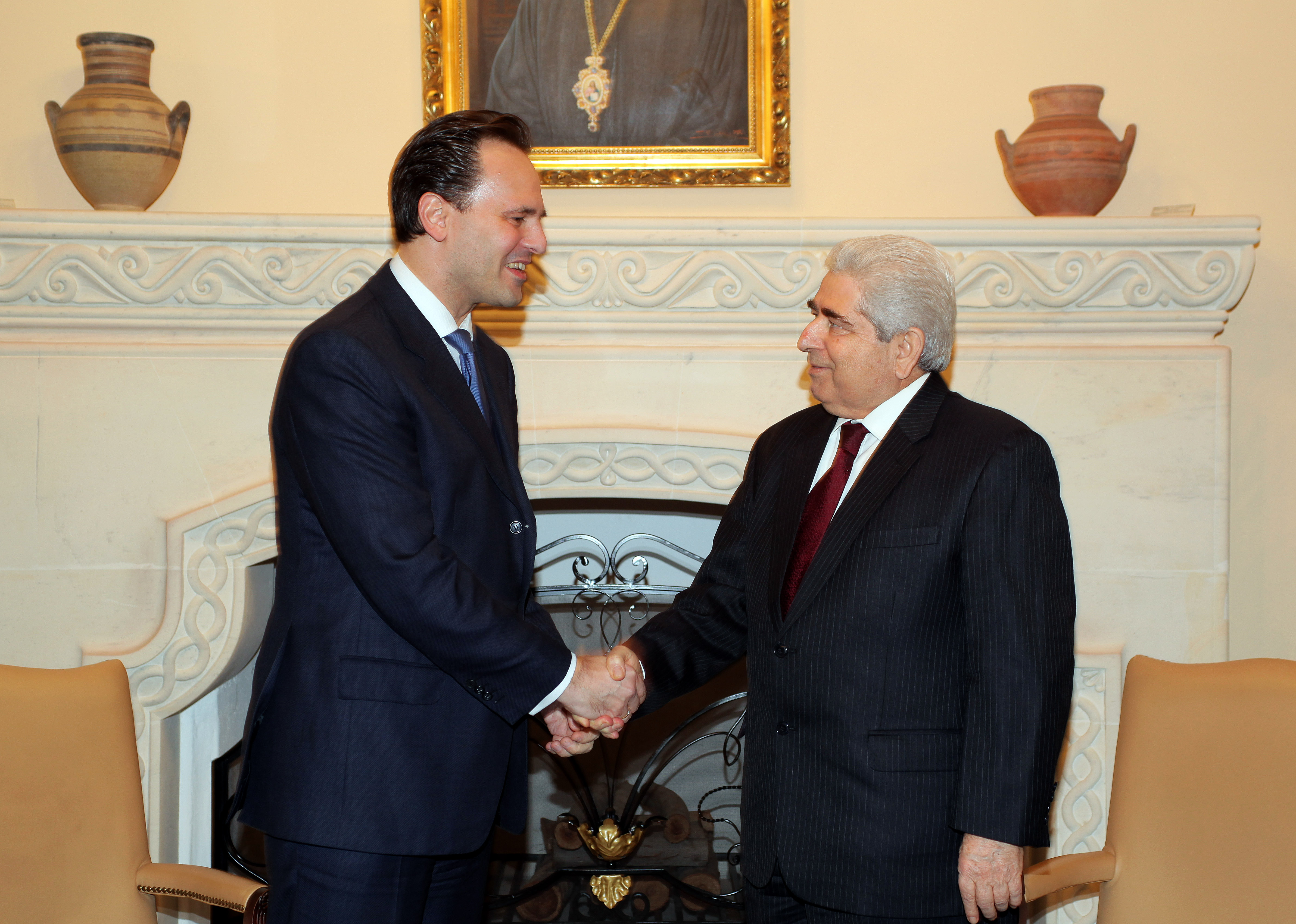 Την Δευτέρα 14 και Τρίτη 15 Φεβρουαρίου 2011, ο Υπουργός Εξωτερικών Δημήτρης Δρούτσας επισκέφθηκε την Κύπρο όπου παρακάθισε σε δείπνο εργασίας που παρέθεσε προς τιμήν του ο Πρόεδρος της Κυπριακής Δημοκρατίας κ. Χριστόφιας. Επίσης, ο κ. Δρούτσας συναντήθηκε με τον Υπουργό Εξωτερικών κ. Μάρκο Κυπριανού, με τον Πρόεδρο της Βουλής των Αντιπροσώπων κ. Μάριο Καρογιάν καθώς και με τους επικεφαλής των κομμάτων. On 14 and 15 February, Foreign Minister Dimitris Droutsas visited Nicosia, where will attended a working dinner held in his honor by the President of the Republic of Cyprus, Mr. Christofias. Mr. Droutsas also met with Cypriot Foreign Minister Kyprianou, the President of the House of Representatives, Mr. Garoyian, and with the heads of the political parties.